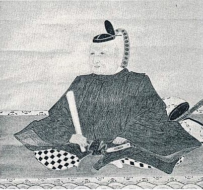 菅沼定盈の肖像(モノクロ)。